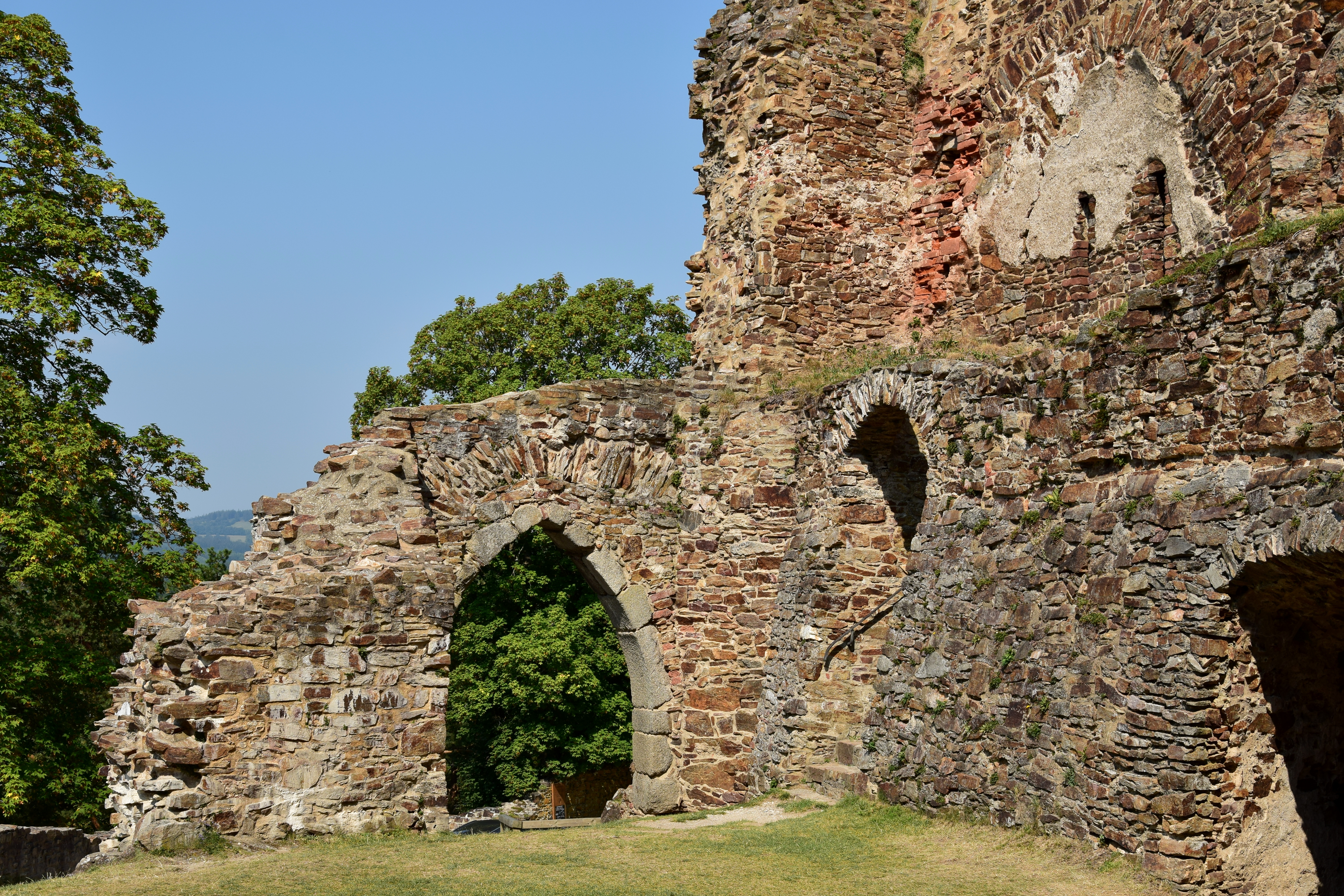 Velhartice – portál brány do hradního jádra